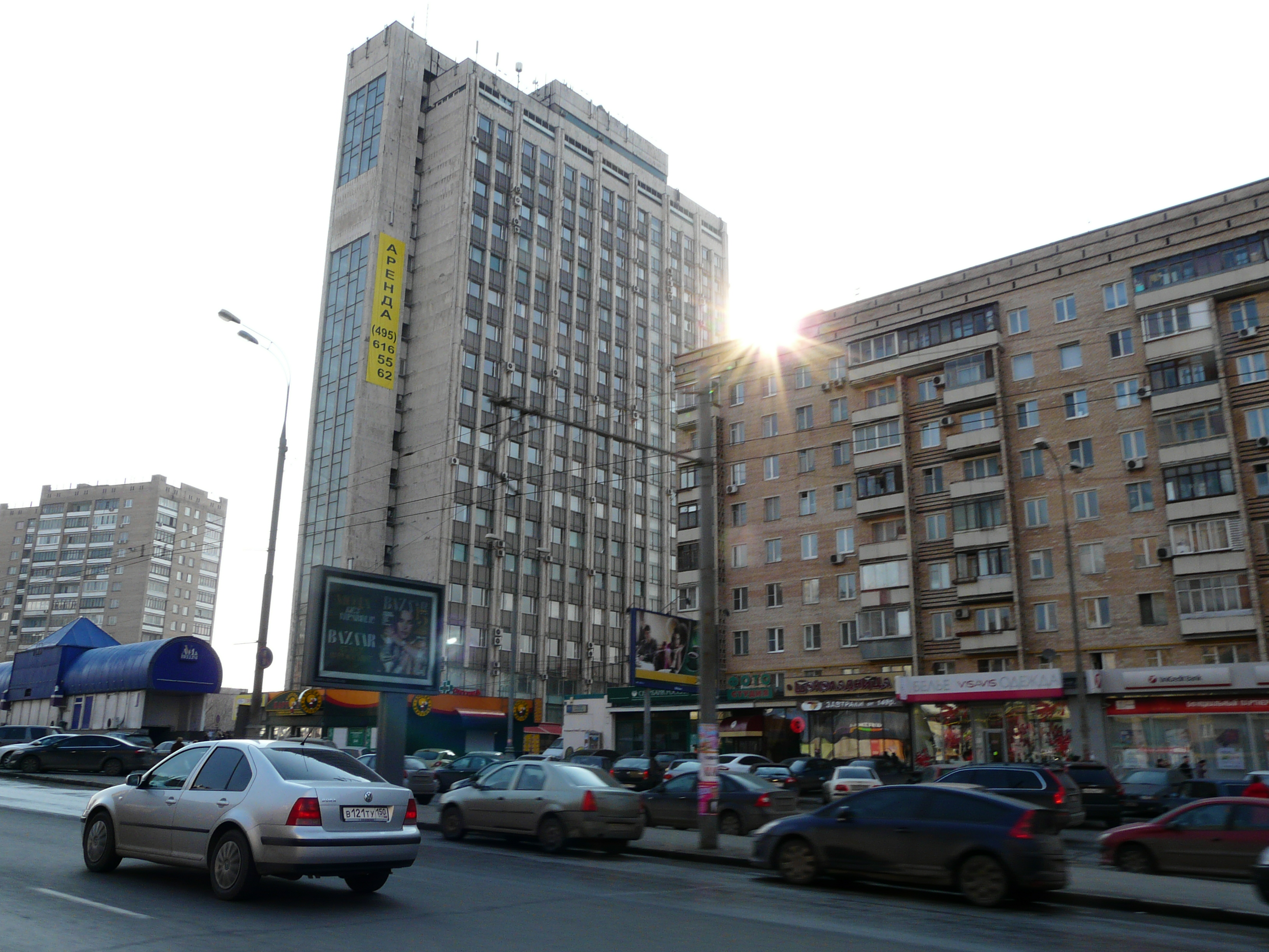 Alexeyevsky District, Moscow, Russia - башня «НИИТеплоприбор» - Проспект Мира 95, 1989 г., и Проспект Мира 97, 1966 г.